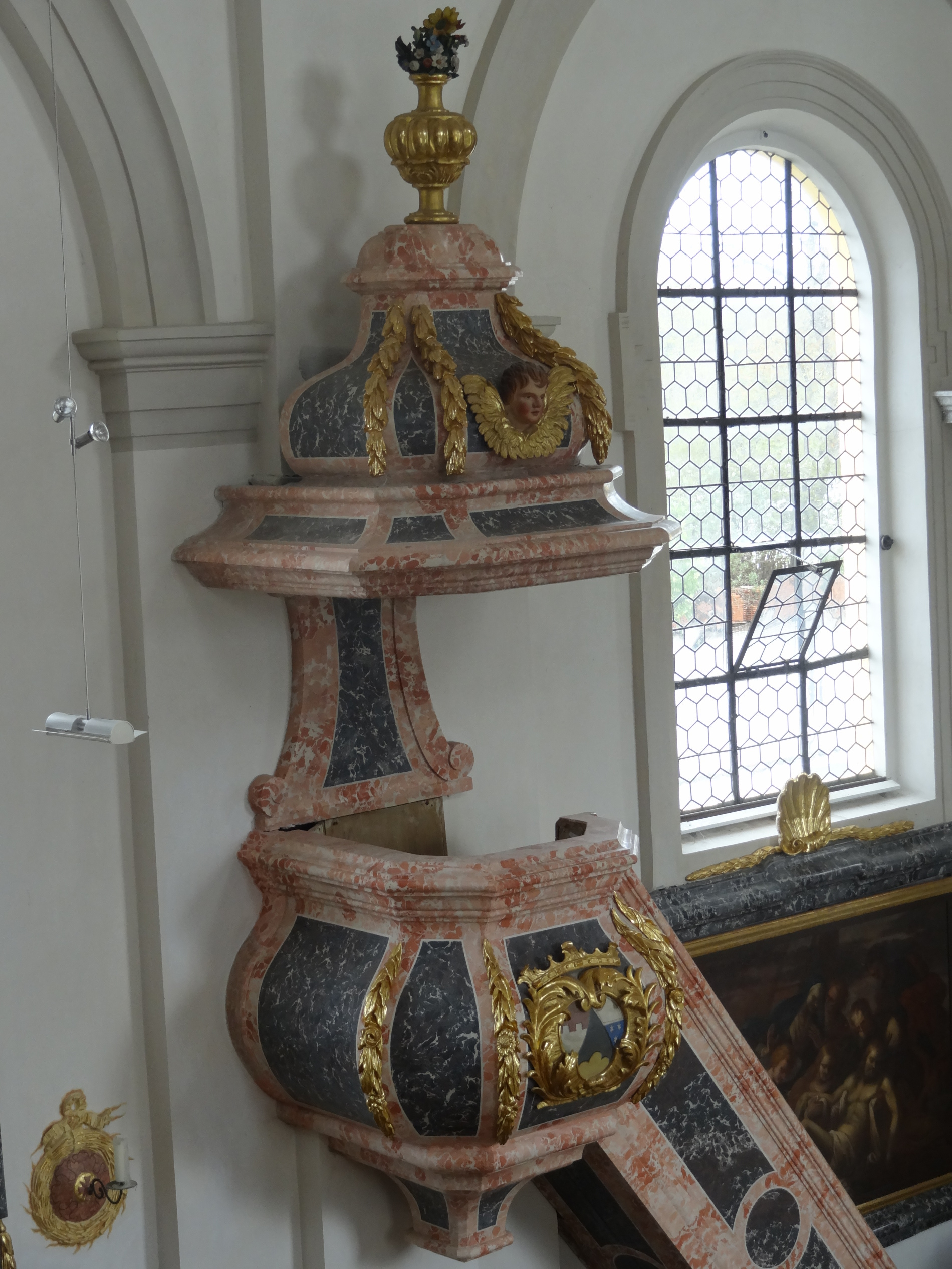 Barocke Kanzel der Pfarrkirche St. Johann Baptist in Eching (Lkr. Landshut)